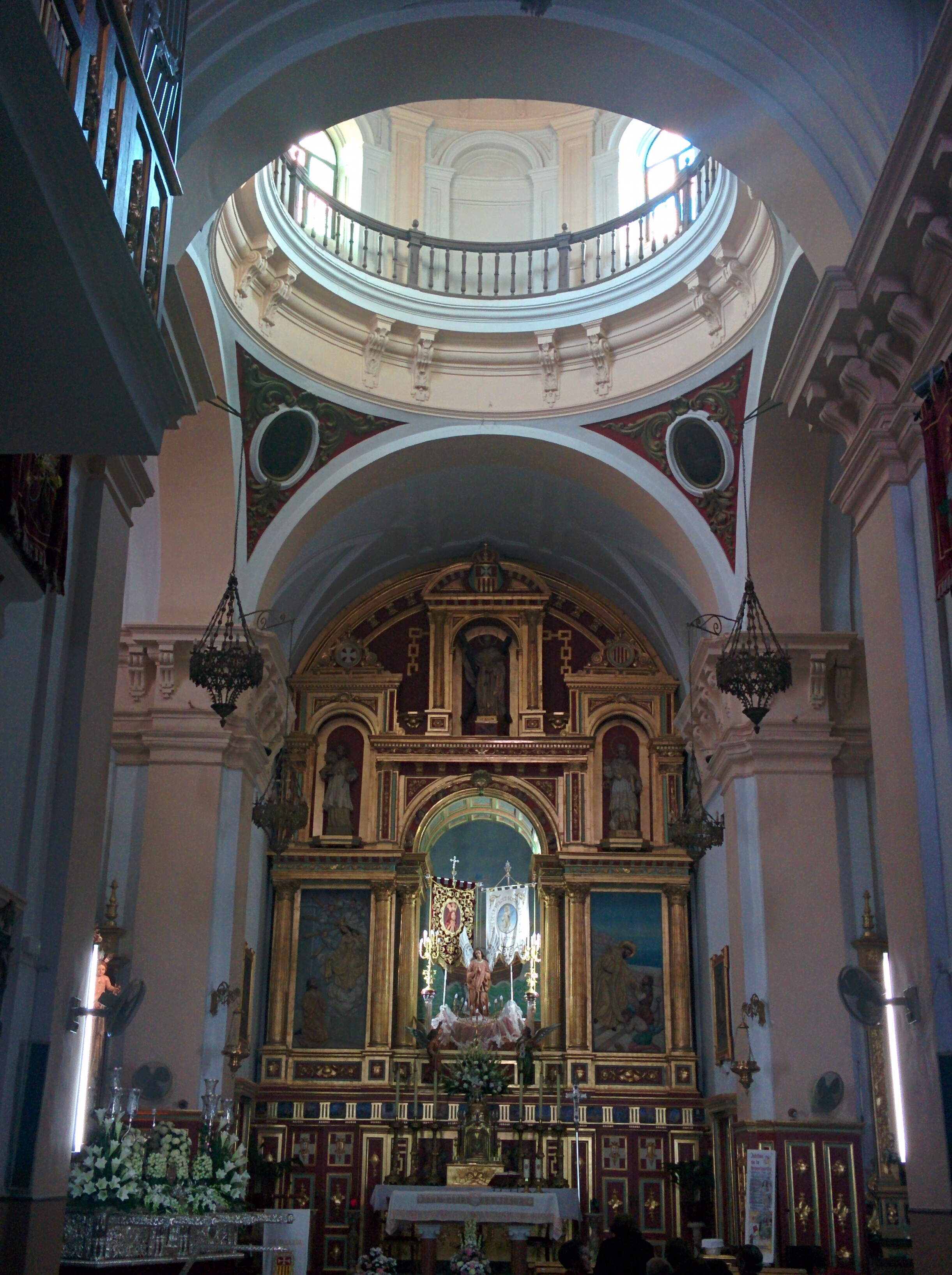 Interior del Convento de Nuestra Señora de la Merced, Herencia (Ciudad Real, España).